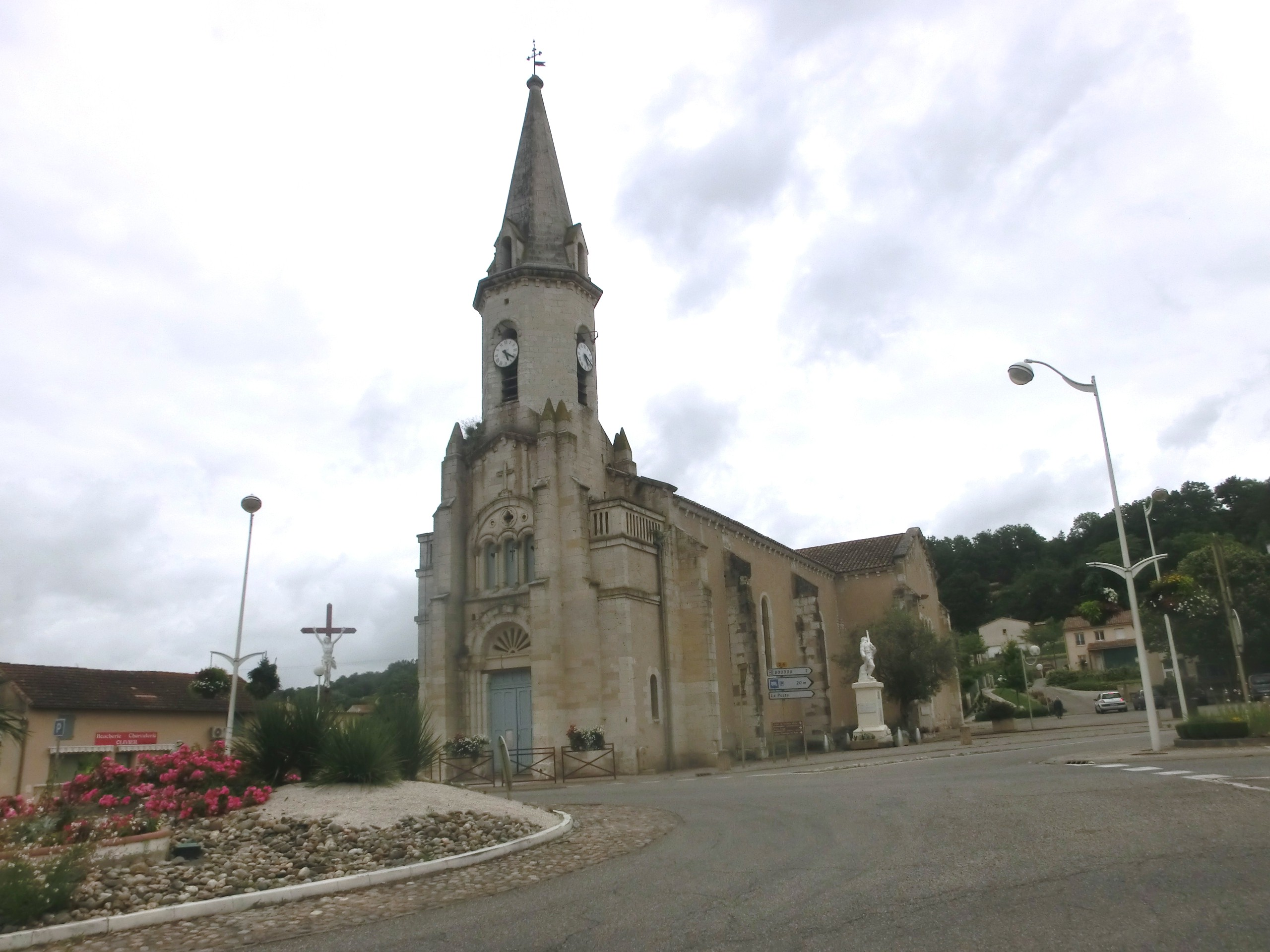 l'église